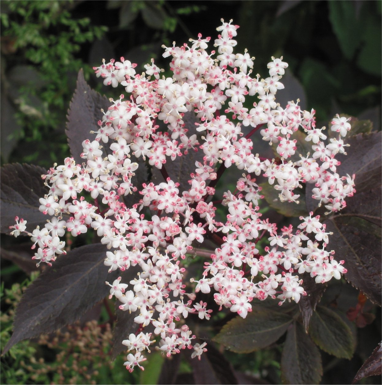 (nl: Gewone vlier) Sambucus nigra